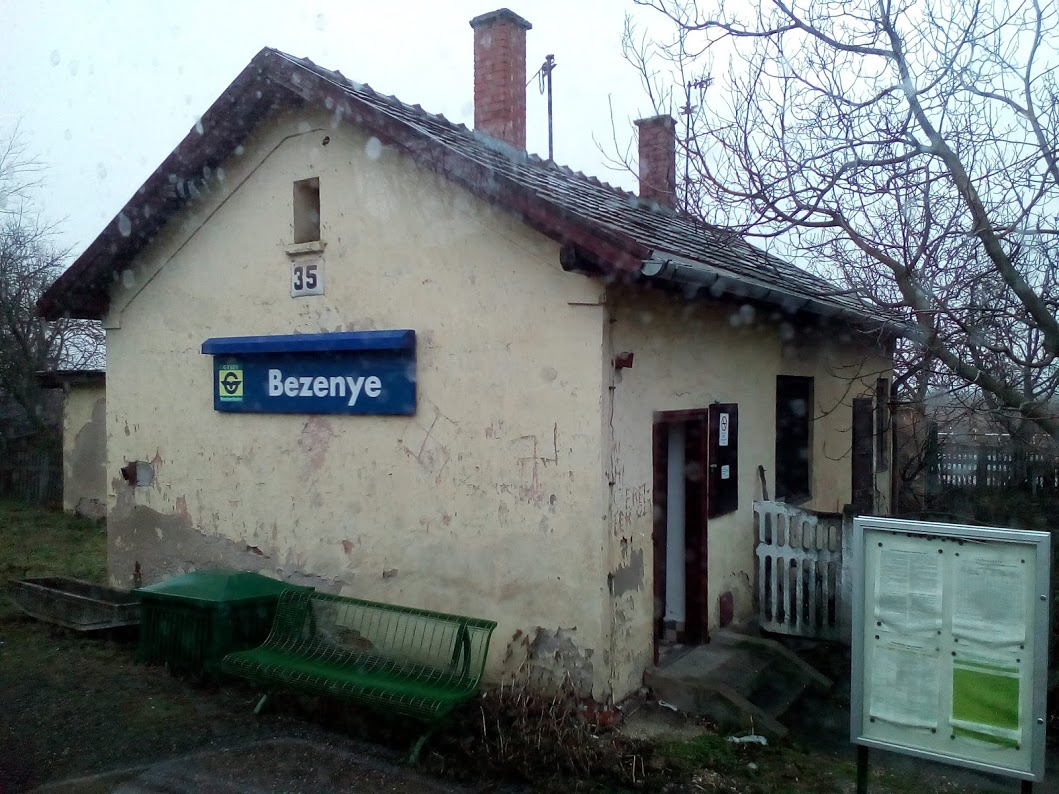 Bezenye vasúti megállóhely